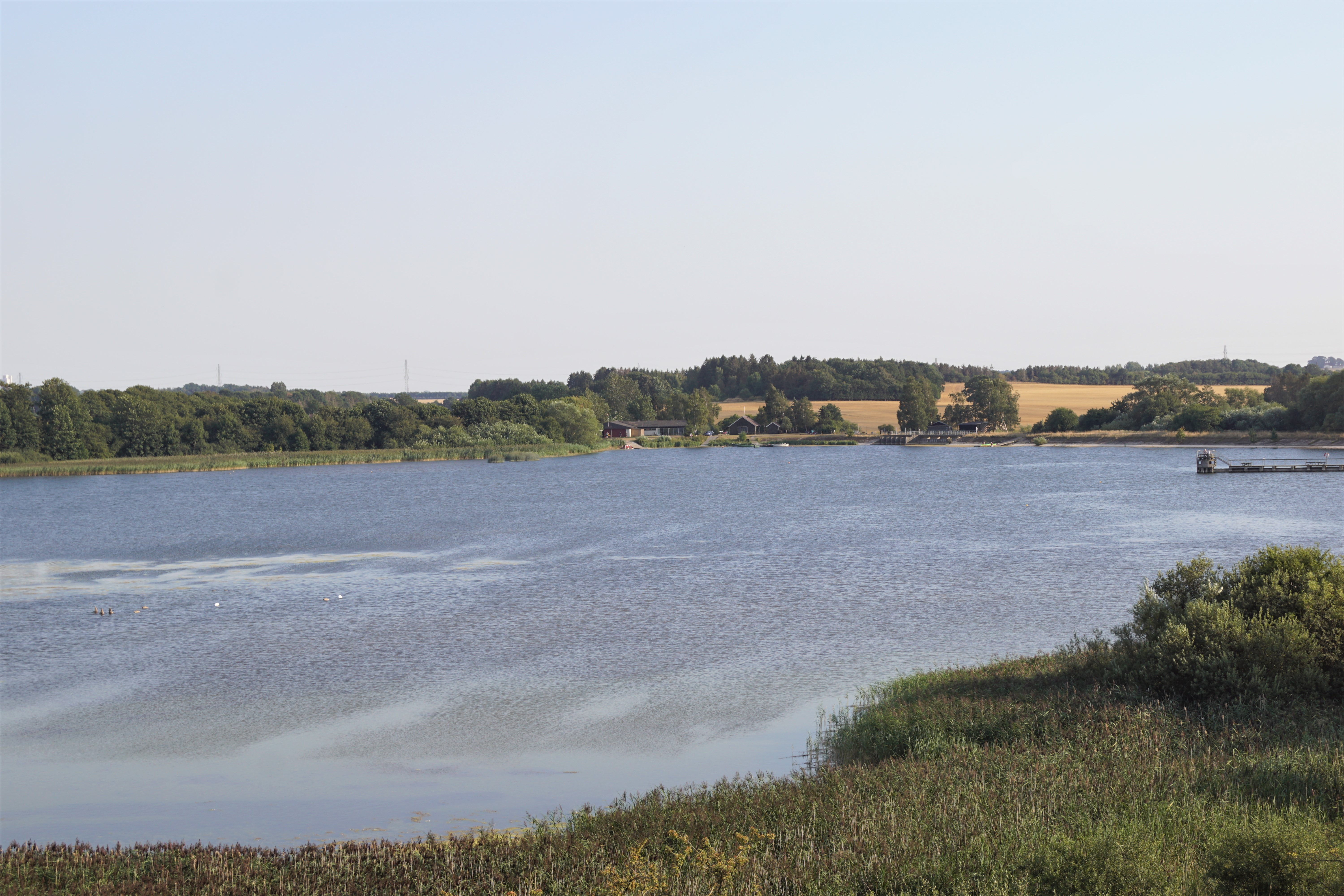 Haraldsted Sø set mod sydøst